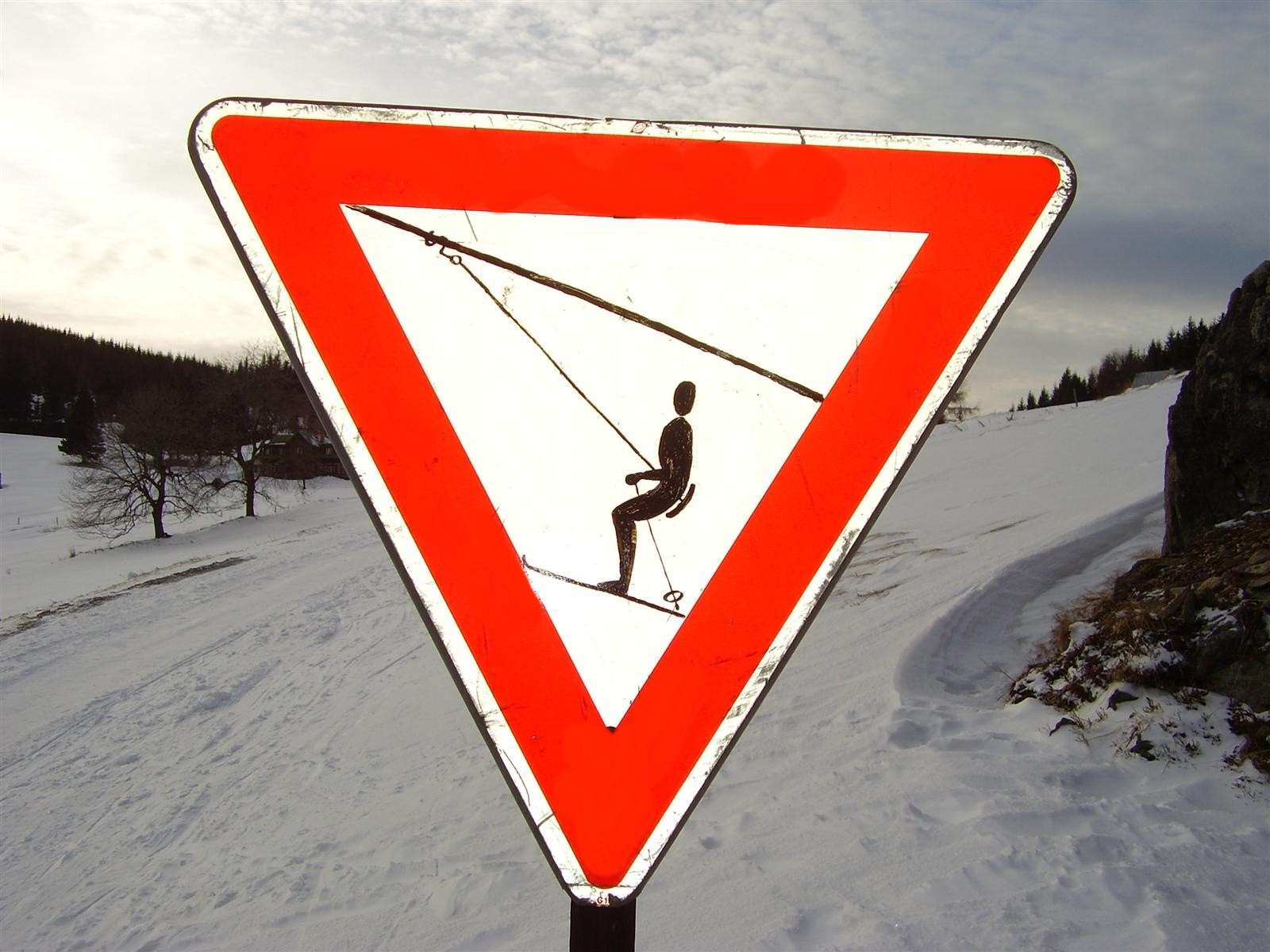 Značka - Pozor vlek!